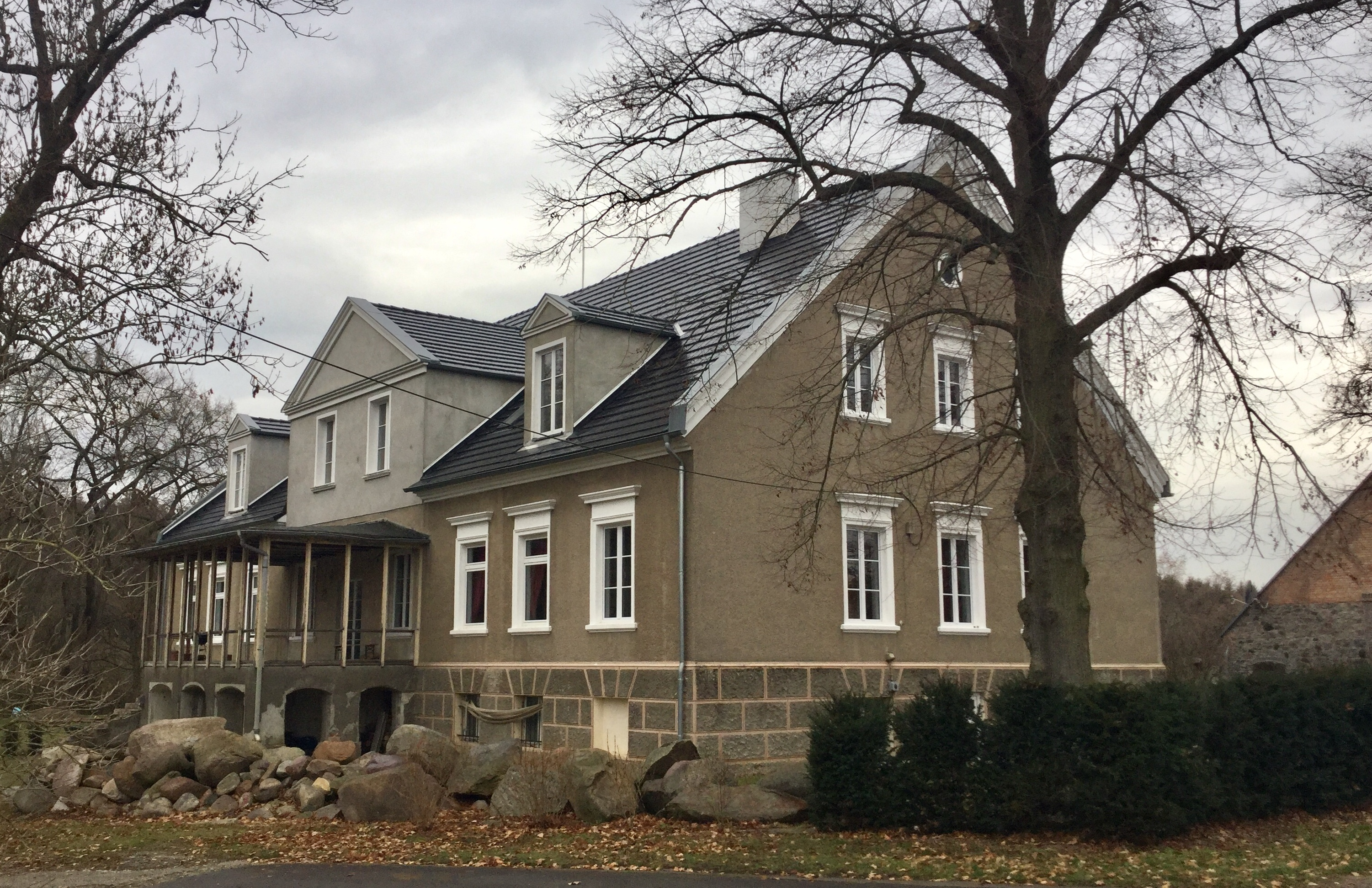 Haus in Pabsdorf